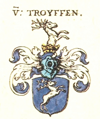 Coat of Arms, Troyff Family, Meissen Saxony (from: Johann Siebmacher: New Wappenbuch, scan from: Horst Appuhn, Johann Siebmachers Wappenbuch. Die bibliophilen Taschenbücher 538, 2. verb. Aufl , Dortmund 1989 Meißner, Blatt 156)